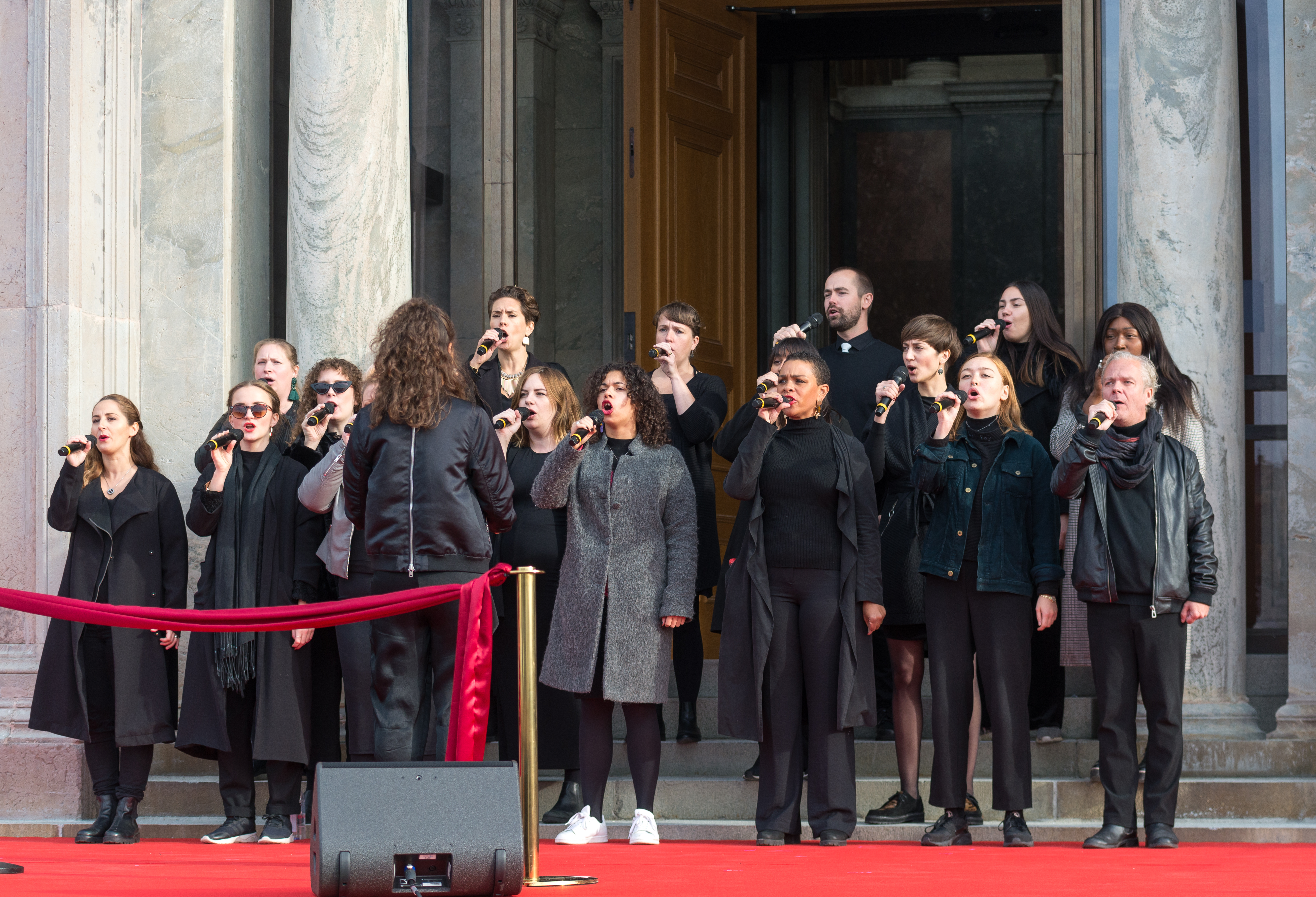 Tensta Gospel Choir uppträder i samband med nyinvigningen av Nationalmuseum i Stockholm den 13 oktober 2018.